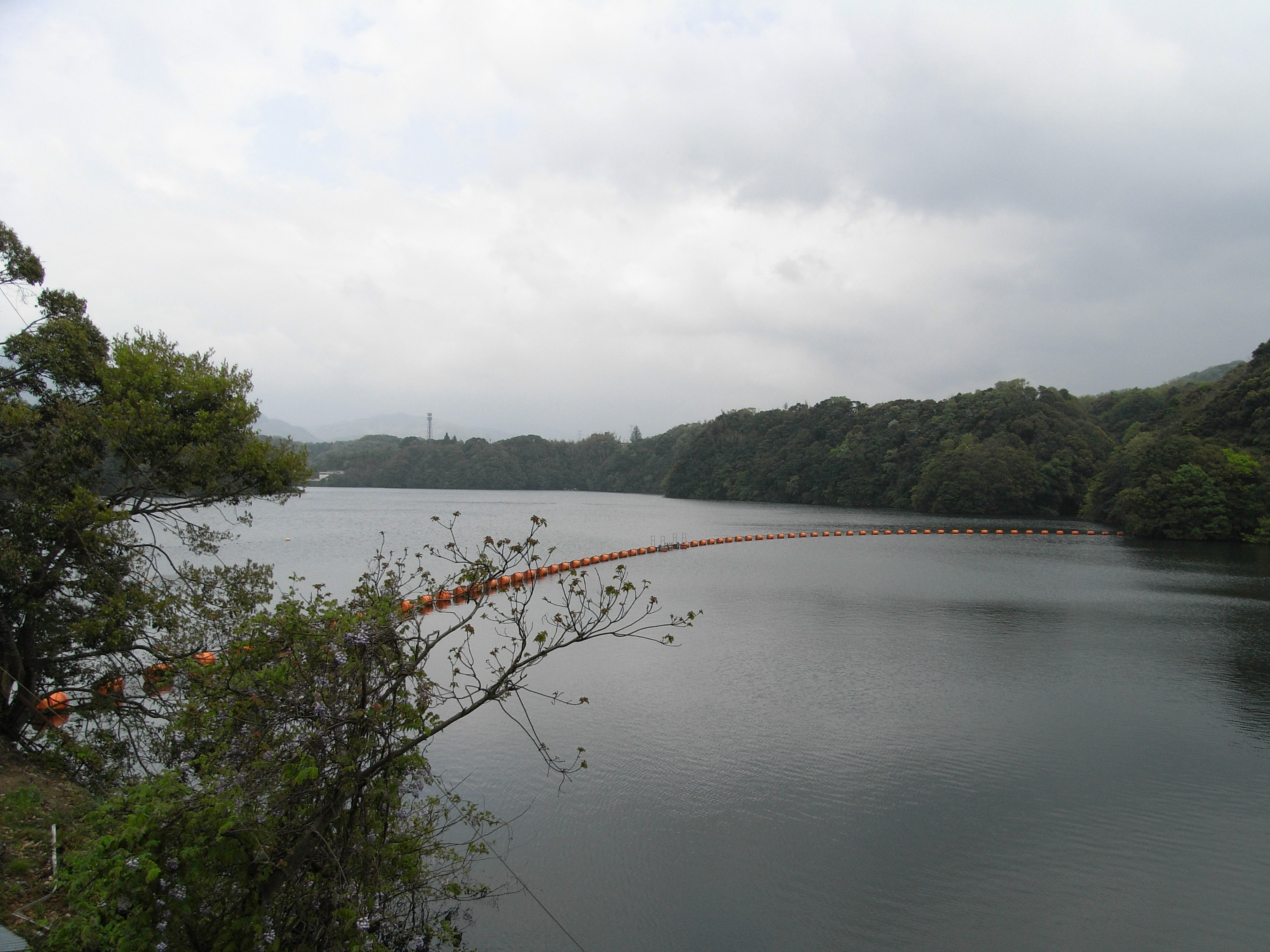 Lake